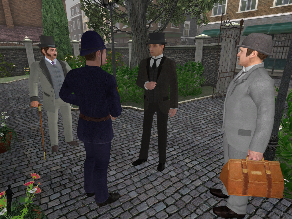 Capture d'écran du jeu Sherlock Holmes : la Nuit des Sacrifiés. Capture prise dans le jardin de la demeure du Capitaine Stenwick sur Melcombe Street, lorsque l'homme en question explique à Holmes et Watson que son serviteur Maori a mystérieusement disparu au cours de la nuit.